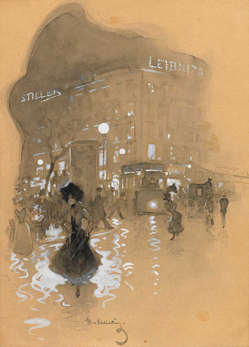 Abendliche Straßenszene in Berlin am Haus "Stiller" / "Leibniz". Gouachiertes Aquarell. 33 x 24,5 cm.